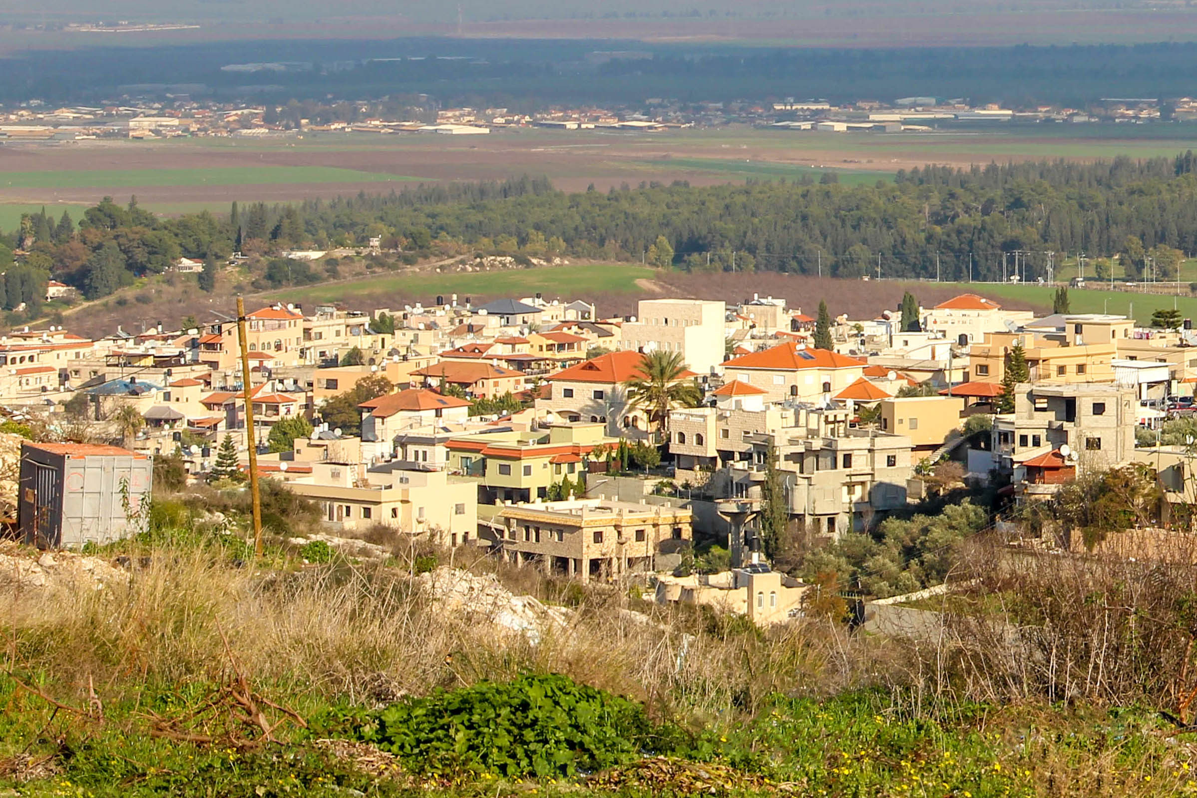 قرية سالم